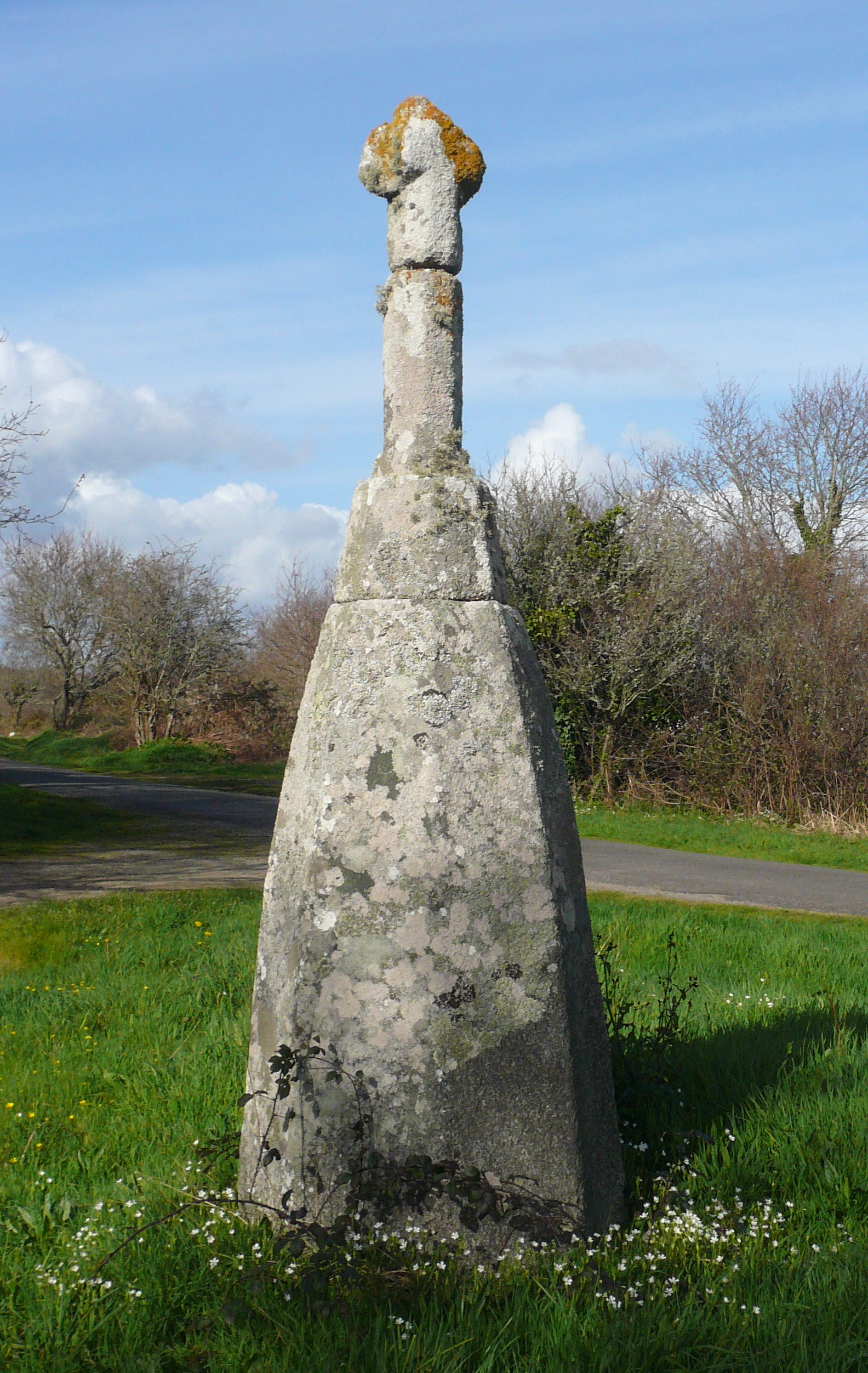 Stèle protohistorique christianisée de Kernalec en Trégunc, Finistère, Bretagne, France.